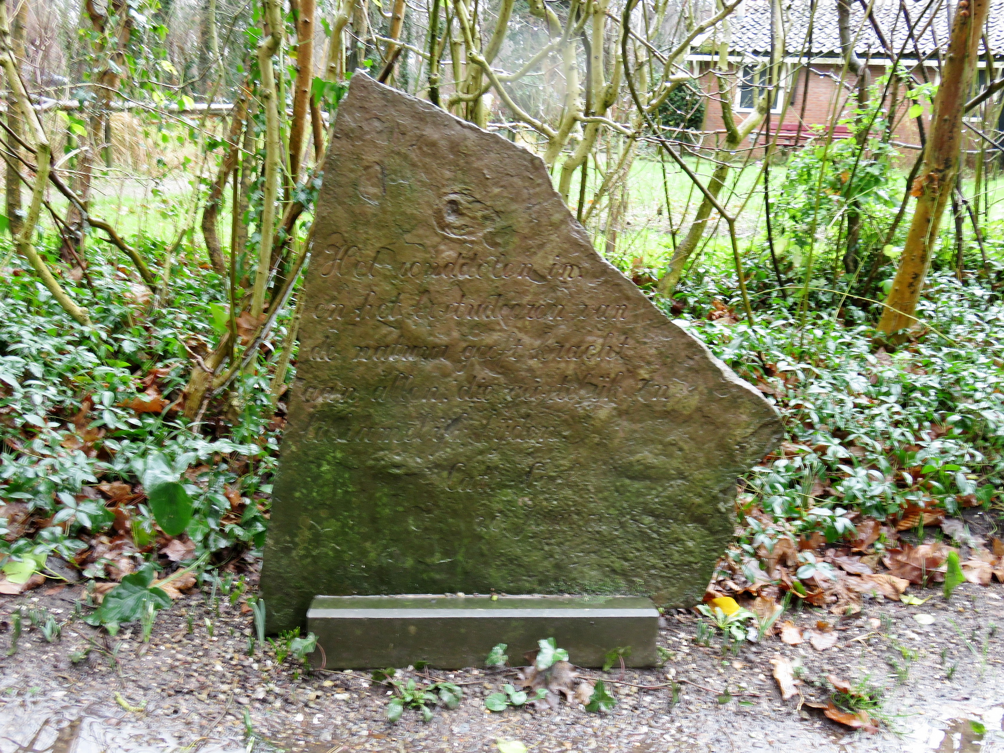 Gedenksteen ter nagedachtenis aan Catharina Cool, Nederlands mycologe. De tekst op de steen had zij zelf geschreven: "Het ronddolen in en het bestuderen van de natuur geeft kracht aan allen, die geestelijk en lichamelijk lijden."